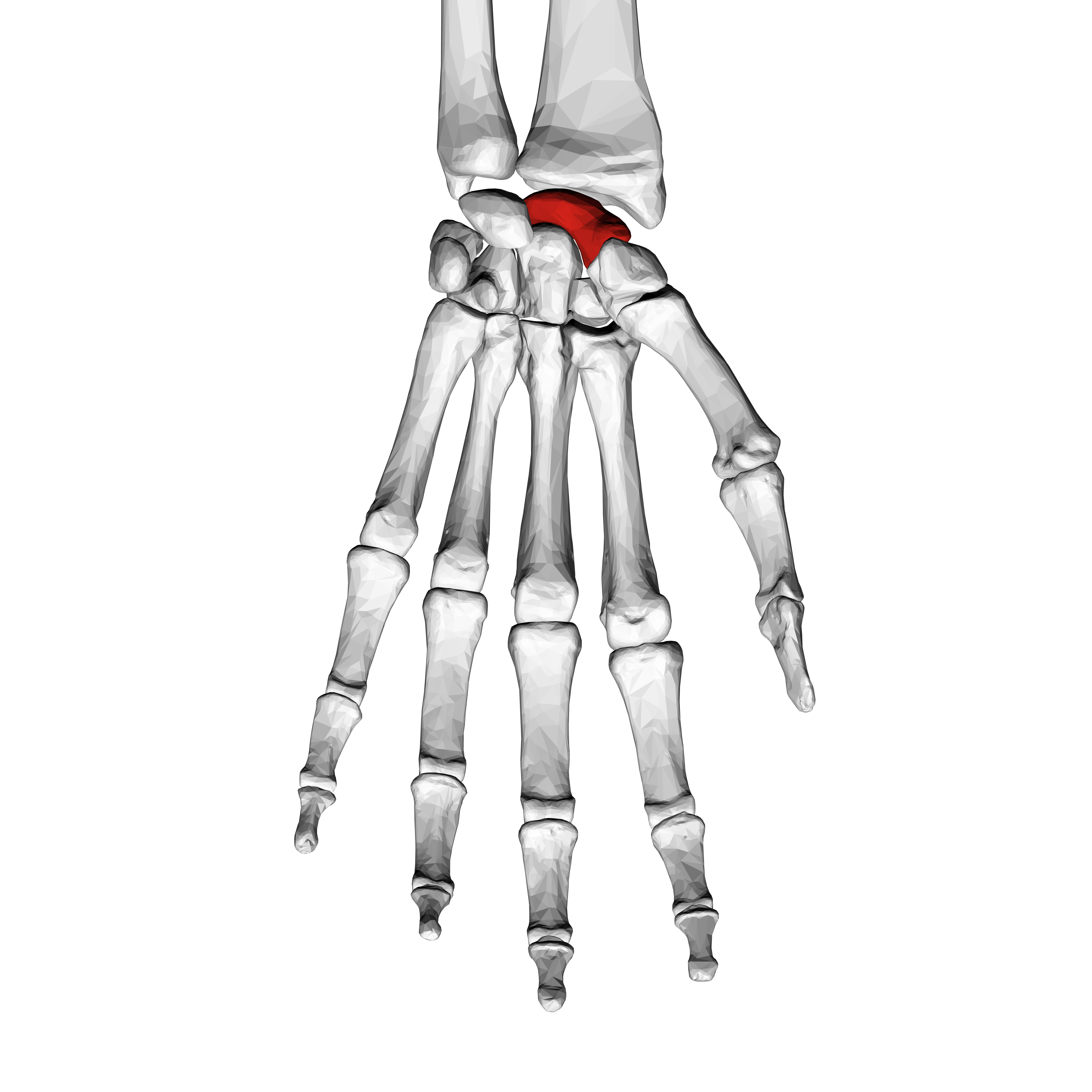 Localisation du scaphoïde